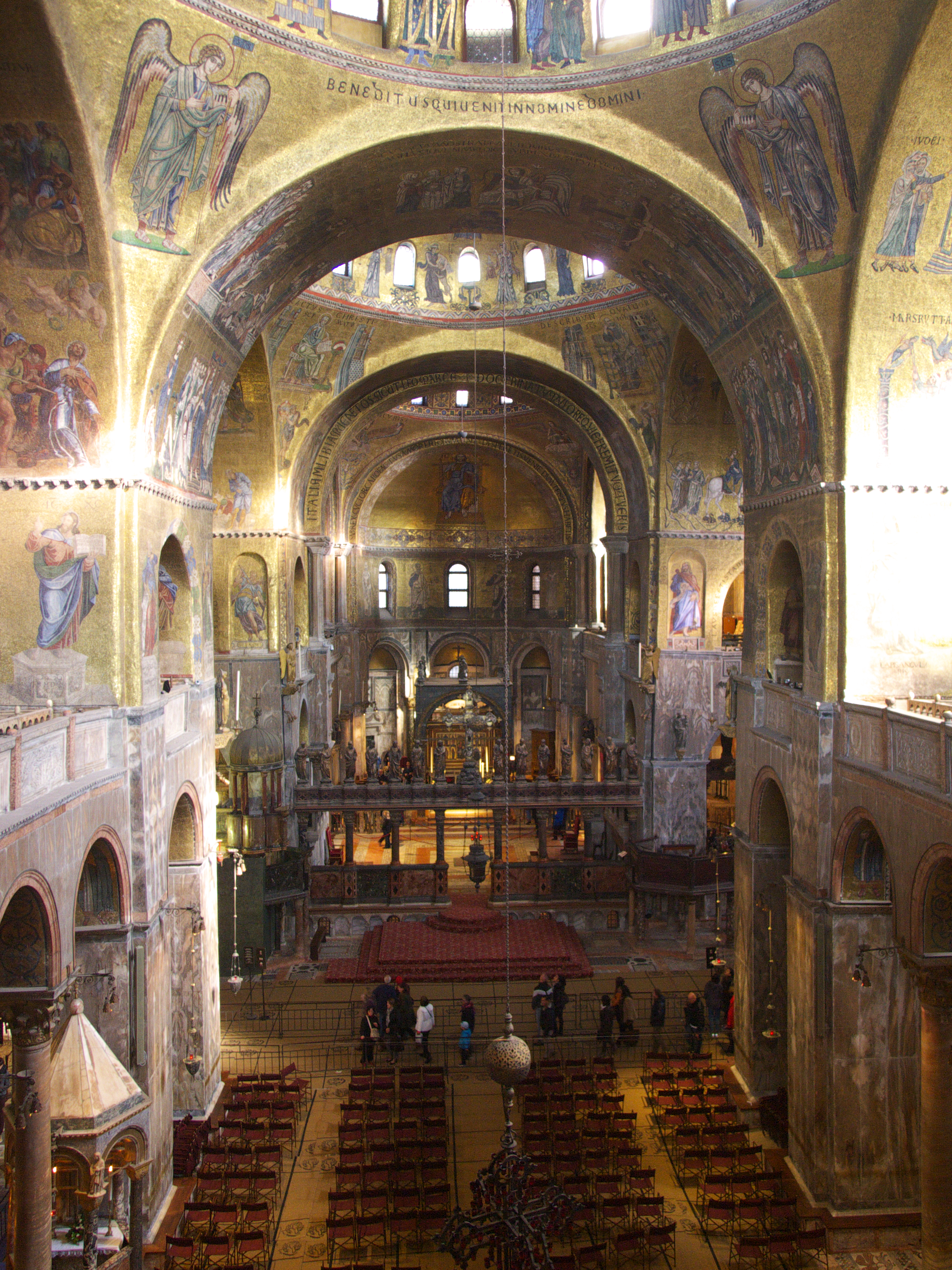 Blick von der Empore über dem Haupteingang: Mystische Aura inmitten von Goldglanz und himmlischen Mosaiken, dessen großflächige Ausgestaltung den Dom von seiner architektonischen Schwere enthebt und durch ihre malerische Verschleifung einen einheitlichen Raumeindruck gewährt.